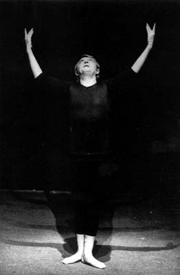 Erdinç Dinçer "Ağaç ve Adam" gösterisini sunarken